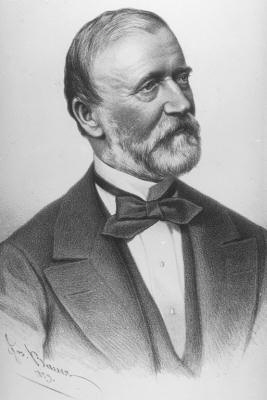 Wilhelm von Engerth, Austrian Engineer, Lithographie von A. Bauer, 1879